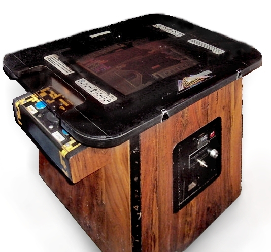 arcade cabinet cocktail table